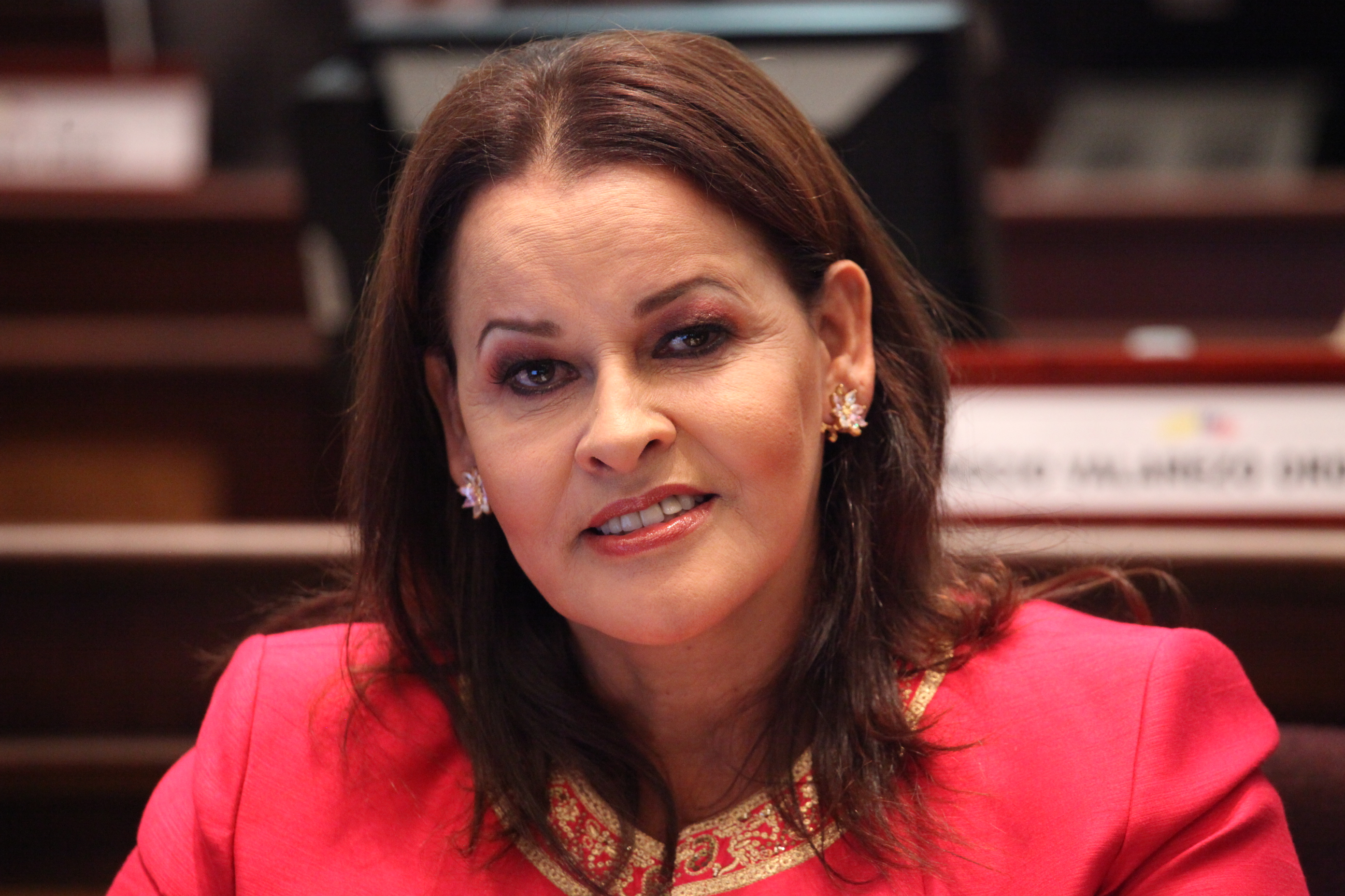 Foto: Hugo Ortiz Ron / Asamblea Nacional